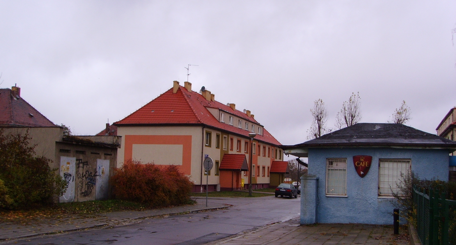 Byłe koszary WOP w Gubinie (10 lat po rozwiązaniu jednostek)